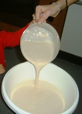 Pfannkuchenteig, Rührteig beim Umfüllen, Rührschüssel